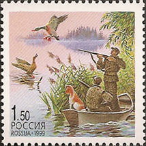 Почтовая марка Россия 1999 год.